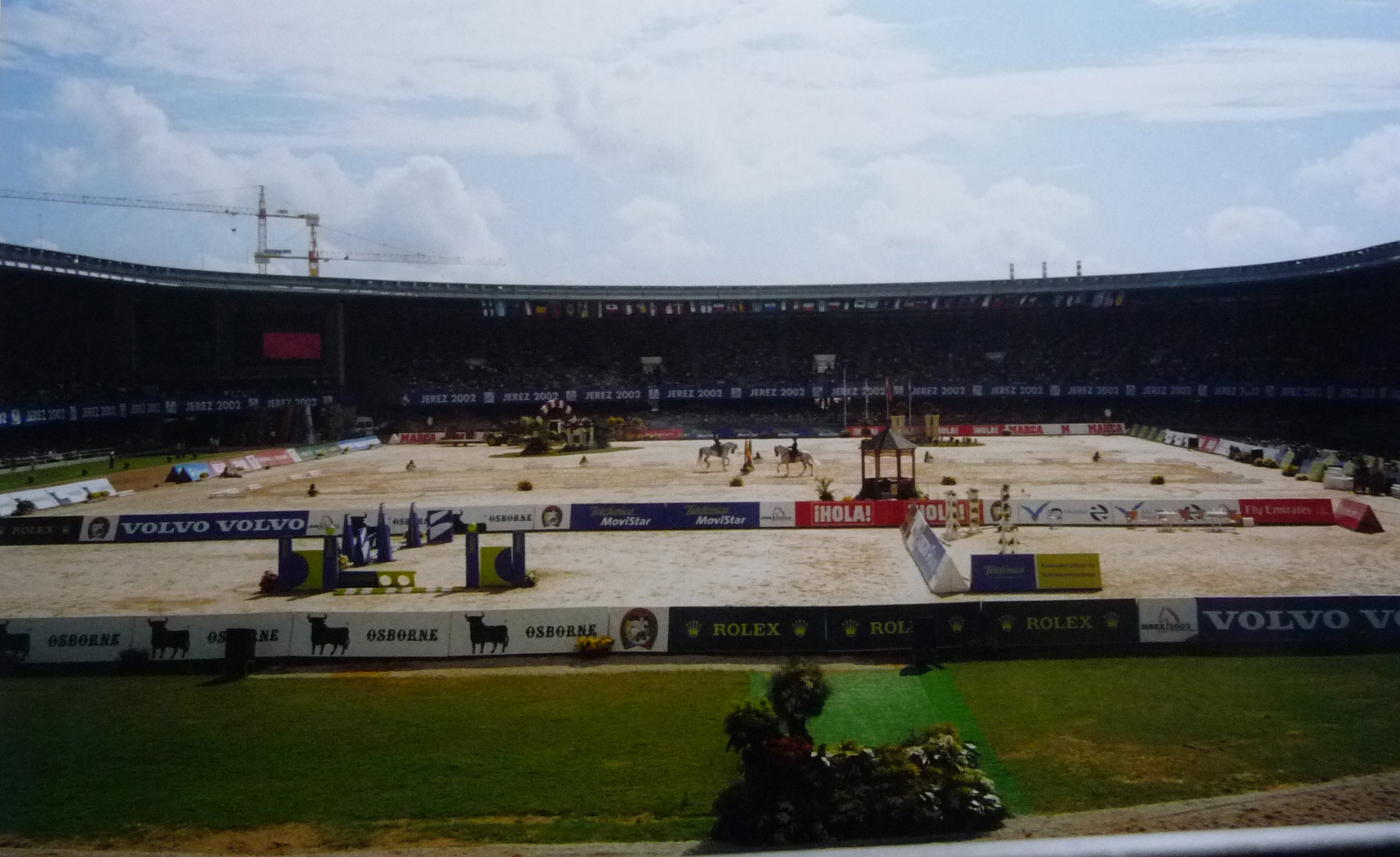 Jerez 2002, Jerez de la Frontera (Andalusia, Spain)